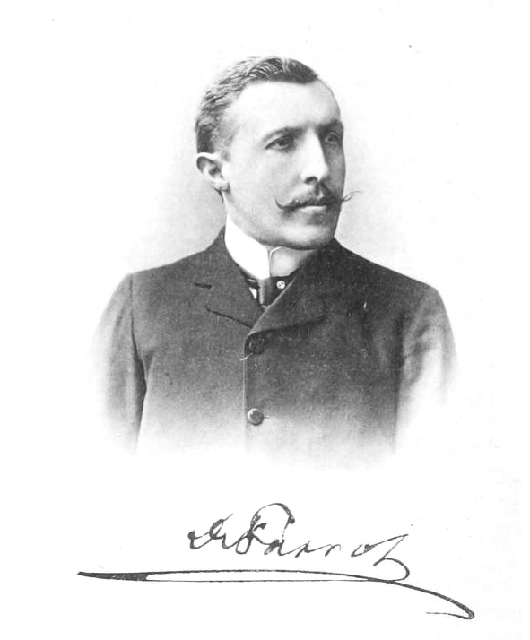 Carl Parrot